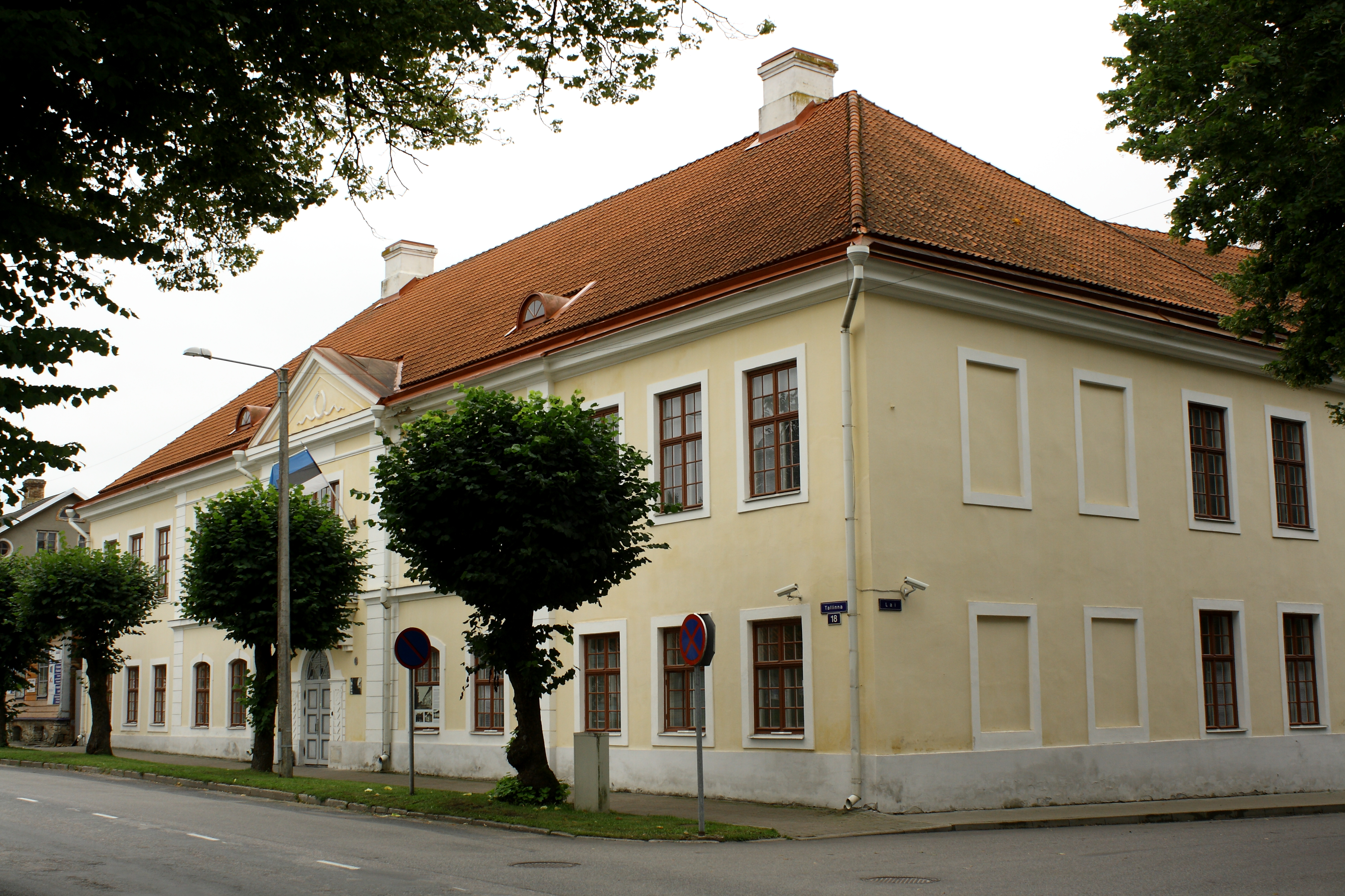 Paide kohtuhoone, ehitismälestis, Tallinna tn 18